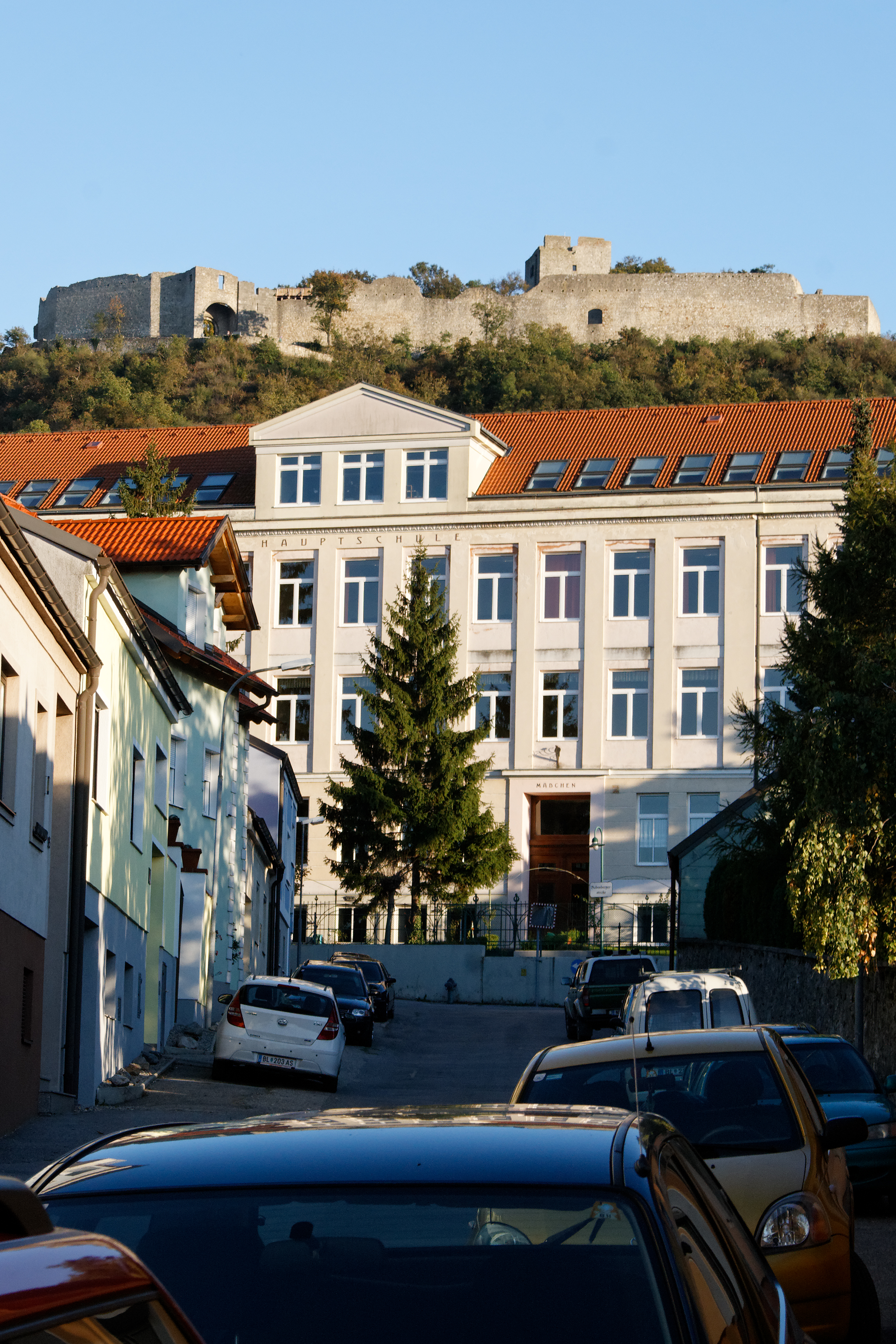 Hauptschule in Hainburg an der Donau (Niederösterreich) mit Blick zur Burg. Die Schule wurde 1908 als Bürgerschule für Knaben und Mädchen errichtet, seit 1927 ist sie Hauptschule.